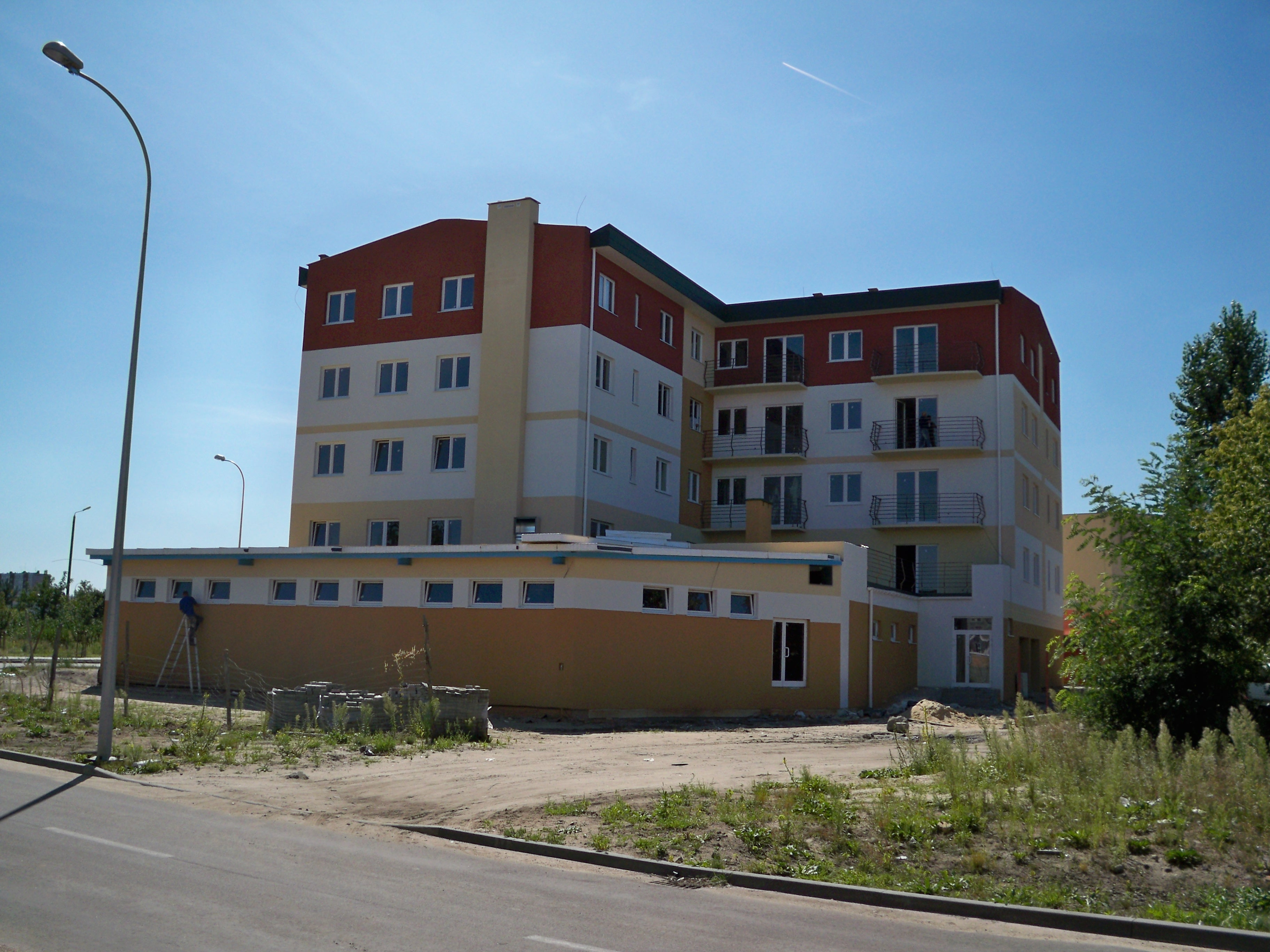 Nowy blok na ul. Celulozowej 21 (2009 r.)